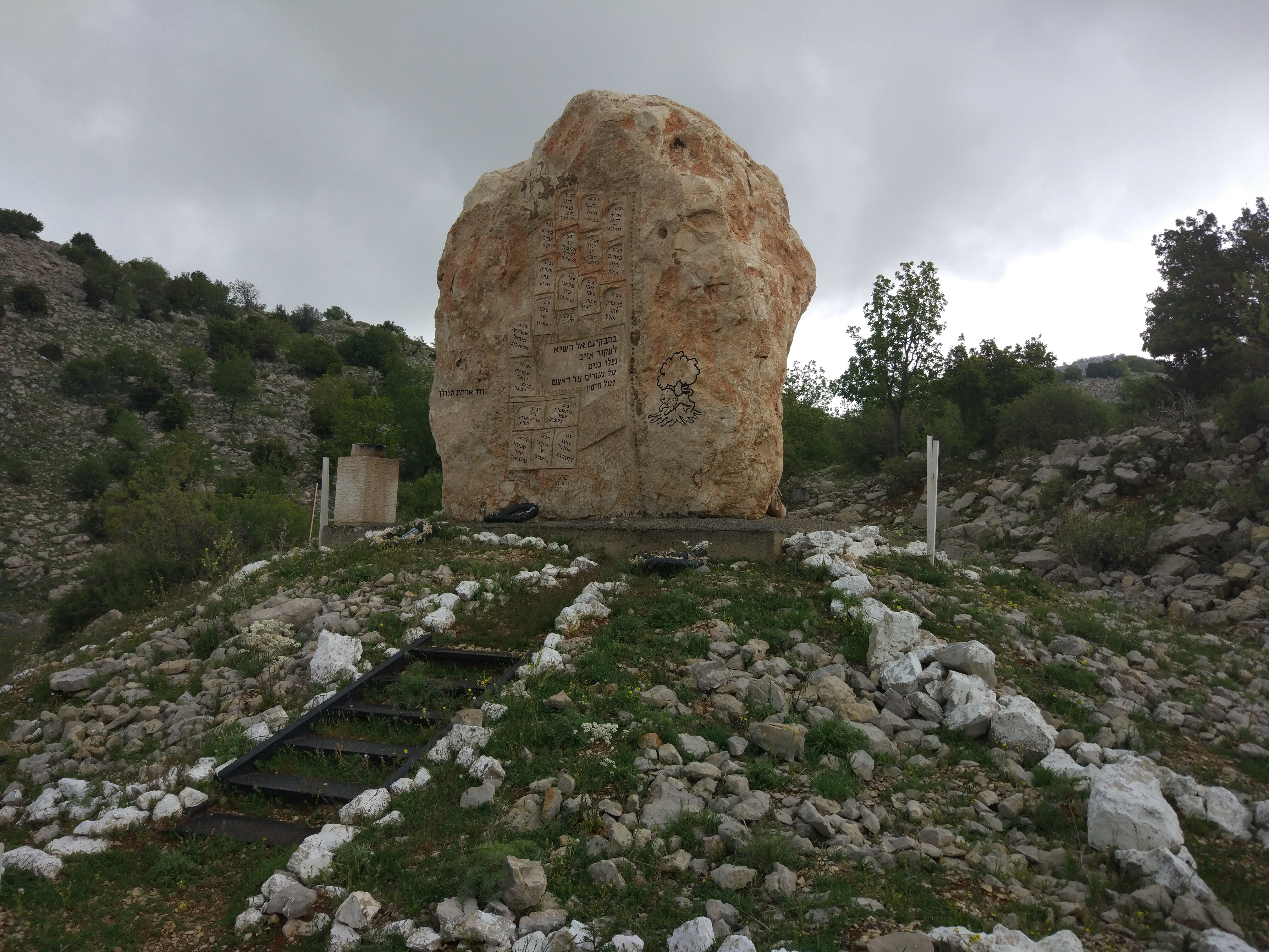 אנדרטת ללוחמי גדוד 17 (אריות הגולן) של גולני שנפלו בחרמון. על כביש 98, סמוך לחניון התחתון של אתר החרמון